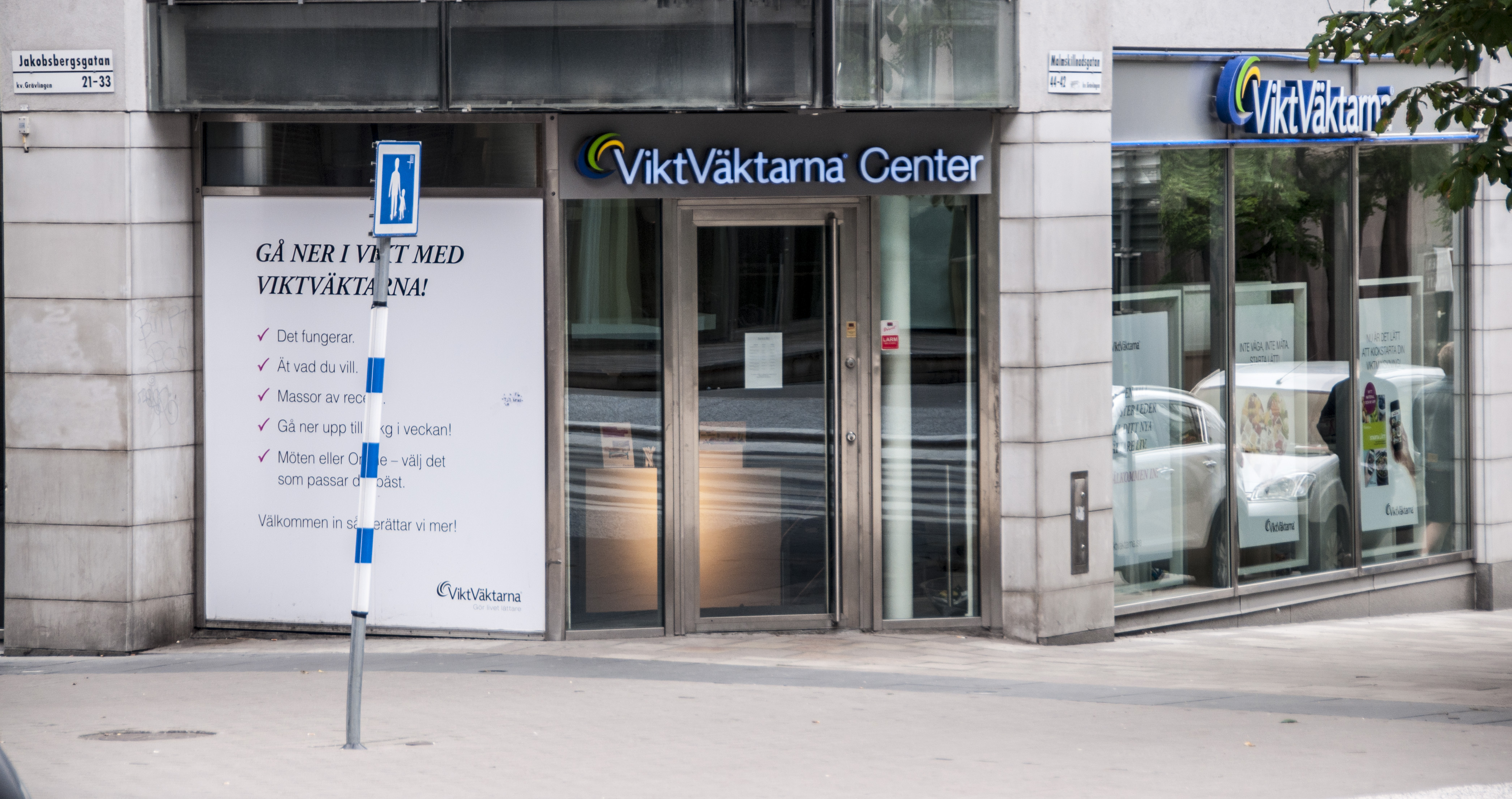 Viktväktarna Center, Stockholm Jakobsbergsg. / Malmskillnadsg